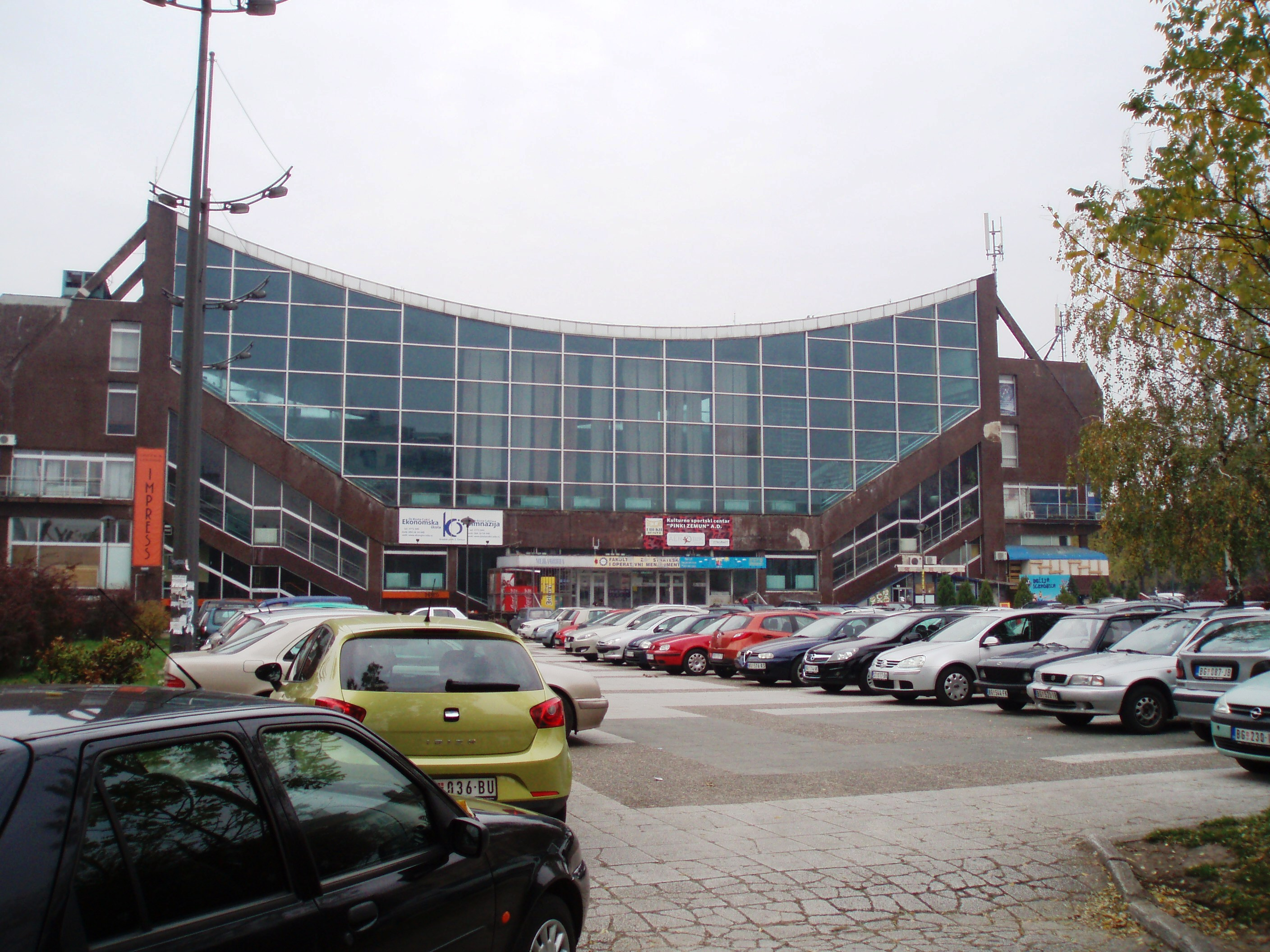 Hala "Pinki" u Zemunu, autor fotografije: Nicolo